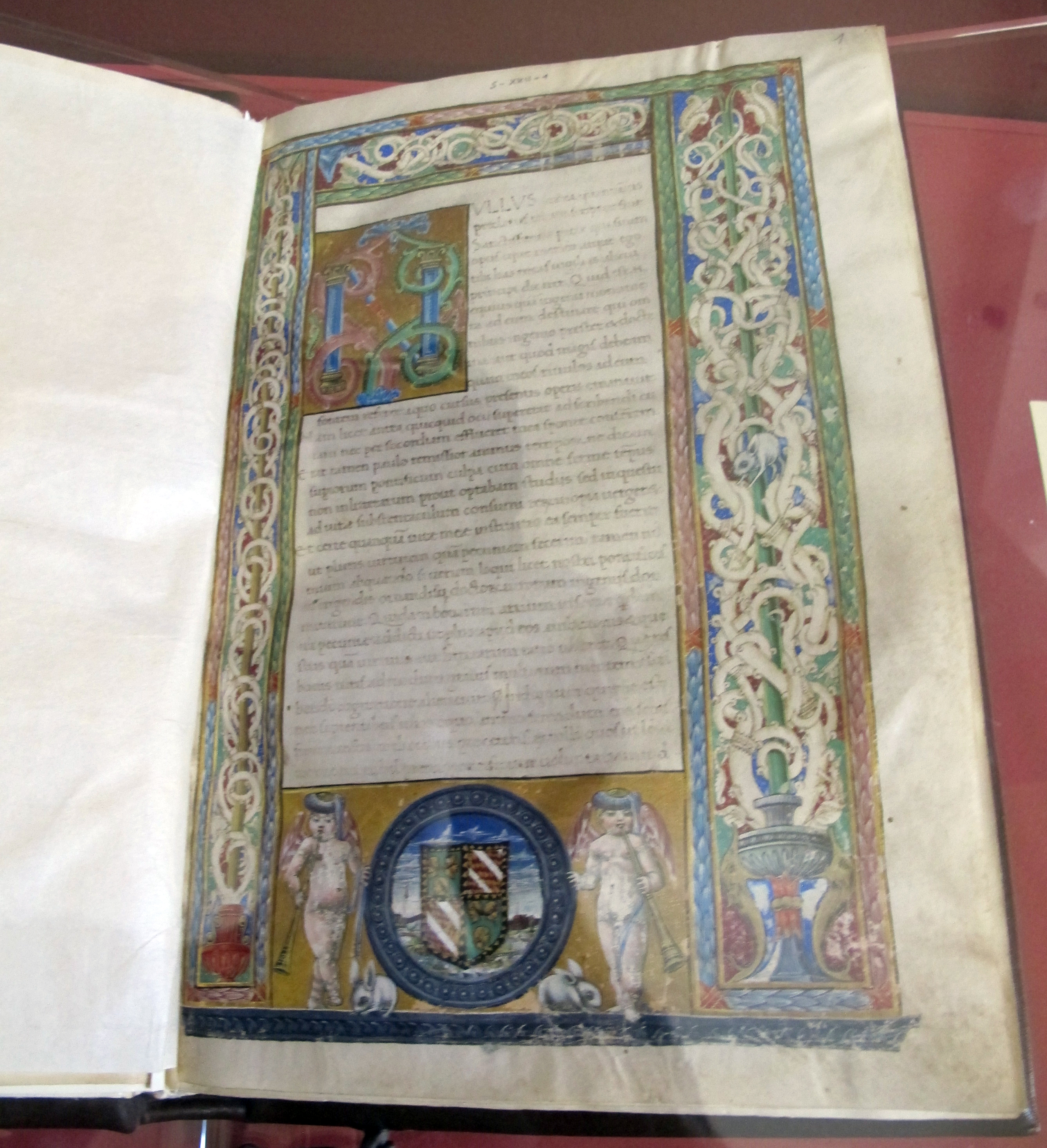 Biblioteca Malatestiana - MIBAC This is a photo of a monument which is part of cultural heritage of Italy.